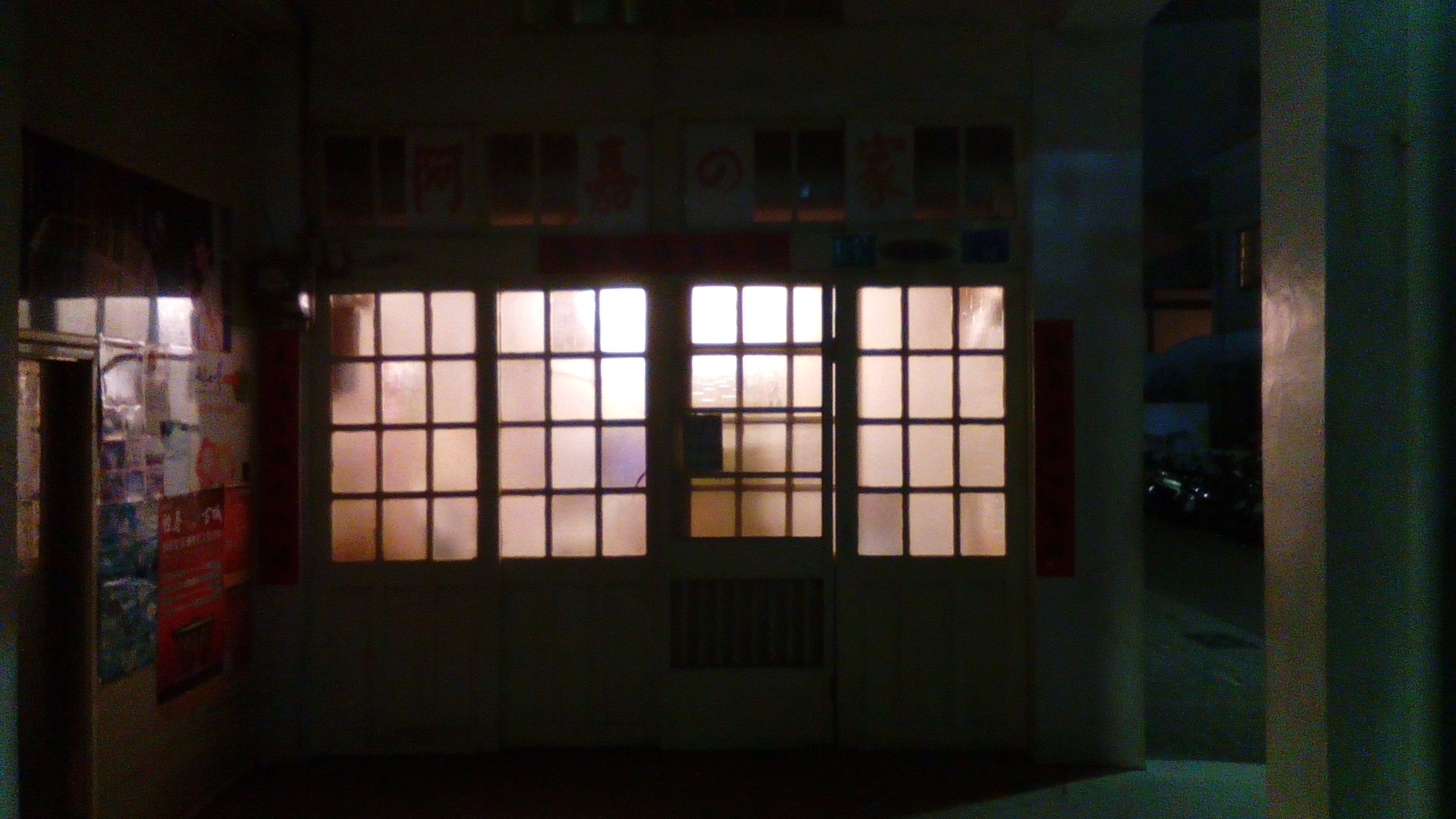 電影海角七號男主角阿嘉(范逸臣)於光明路的住所